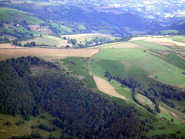 Vue de la route romaine